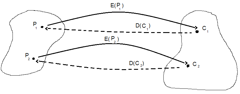 Bild över hur en surjektiv och injektiv funktion kan presenteras.